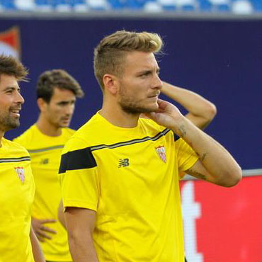 Напередодні матчу за Суперкубок УЄФА у Тбілісі, Грузія.